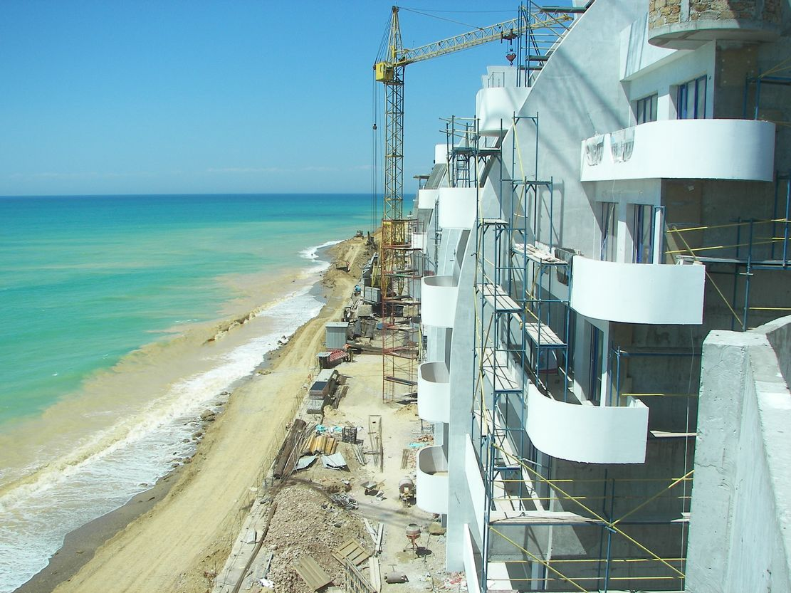 стройка апартаментов "Наш Парус" в Каче 2008